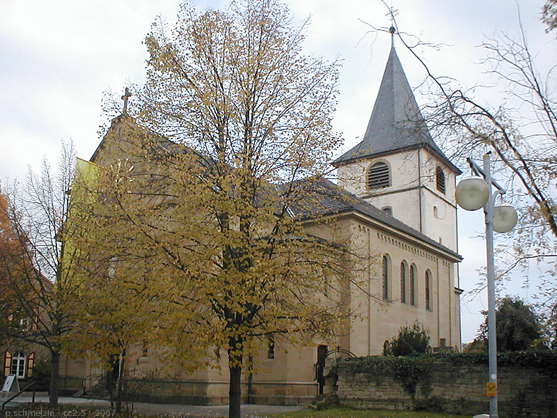 Evang. Kirche in Sulzfeld (Baden), Baden-Württemberg, Deutschland